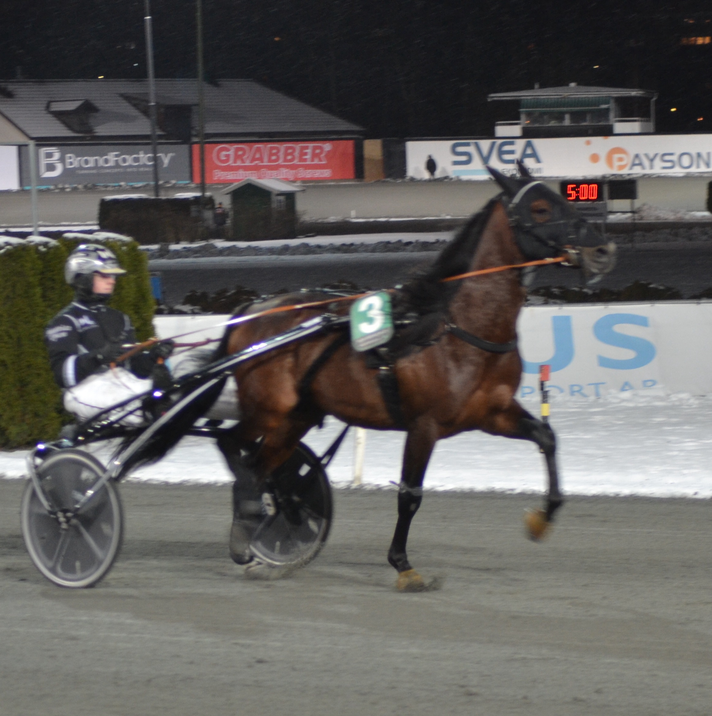 Dartagnan Sisu med sin tränare och kusk Mattias Djuse inför Gunnar Nordins Lopp på Solvalla 2017-12-13.